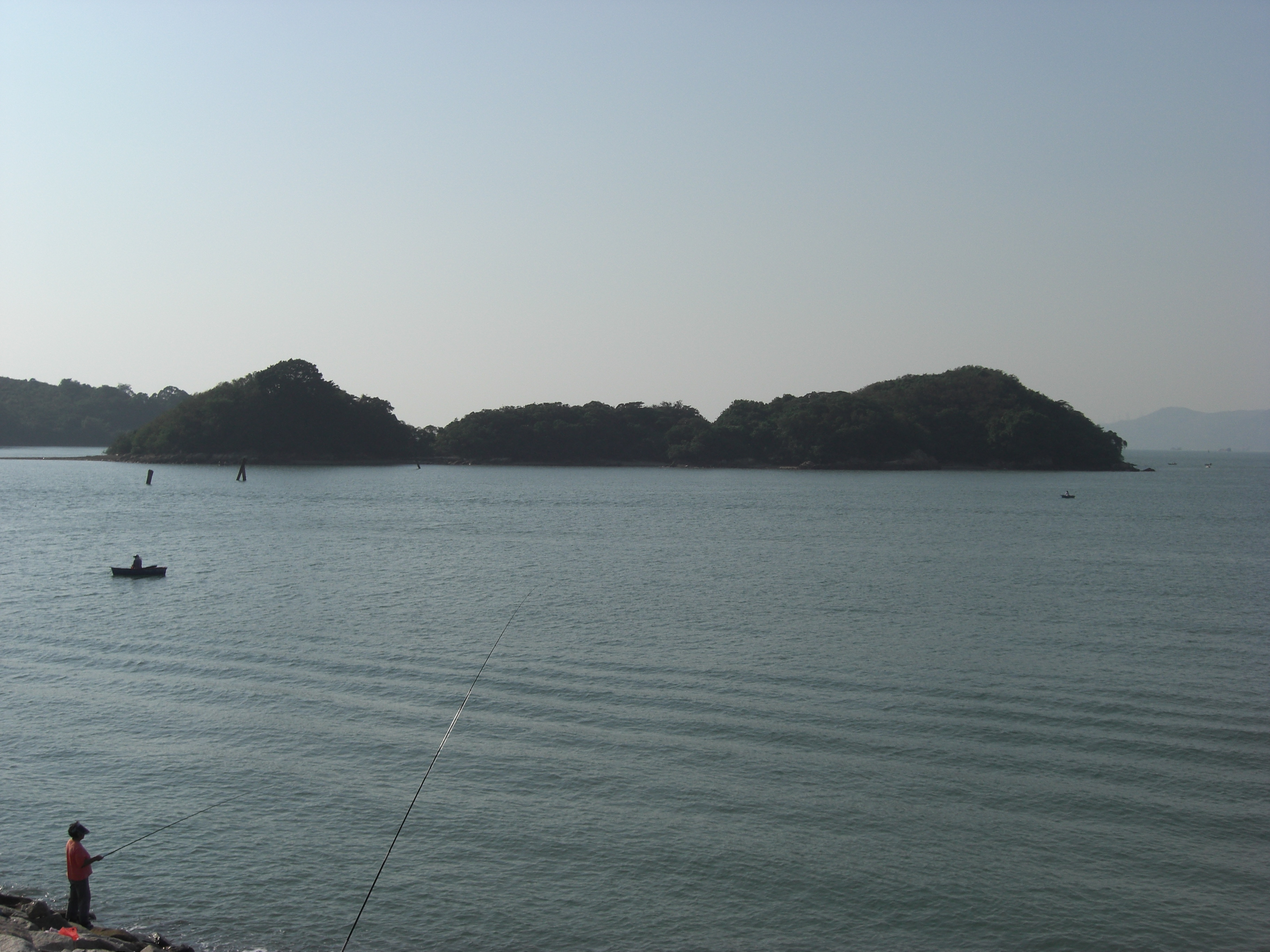 Cheung Sok